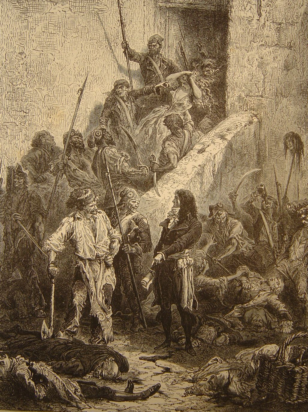 les septembriseurs